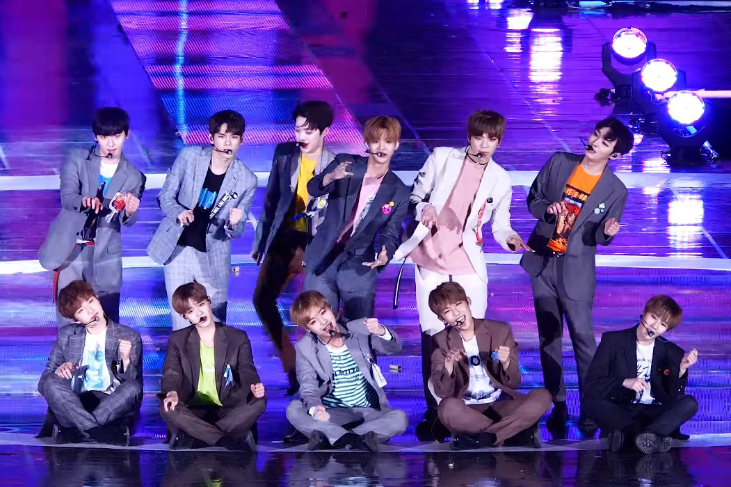 171104 평창 드림콘서트